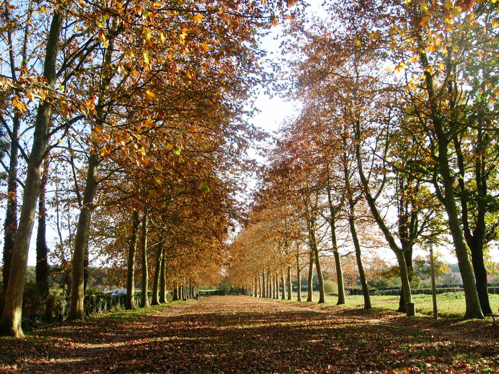 Entrée de l'Allée de Fontenailles à Ecommoy dans la Sarthe